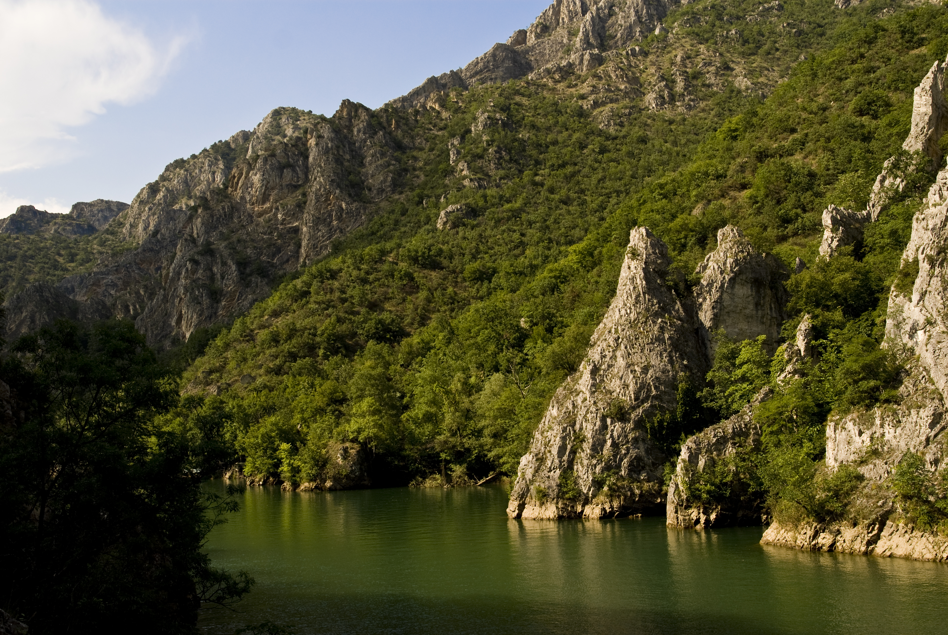 Matka Canyon, Macedonia